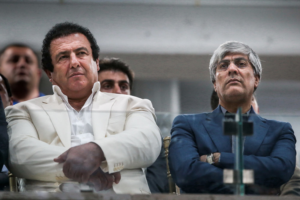 کیومرث هاشمی (راست) و گاگیک تساروکیان (چپ) افتتاحیه چهل وهشتمین دوره مسابقات المپیک ارامنه ایران مراسم افتتاحیه چهل وهشتمین دوره مسابقات المپیک ارامنه ایران عصر سه شنبه با حضور یونسی دستیار رییس جمهور در امور اقلیت ها دینی در باشگاه ارارات برگزارشد.